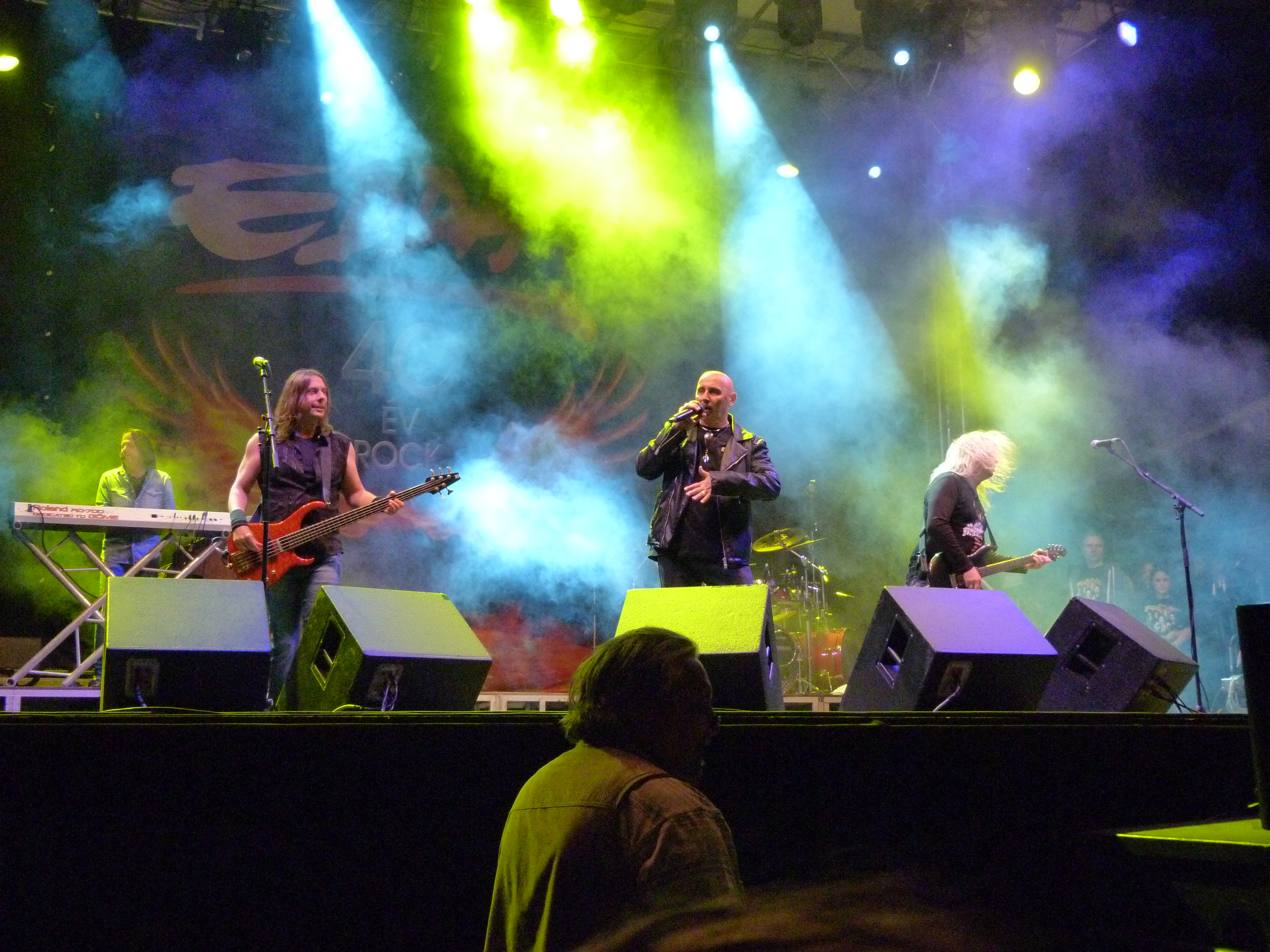 A felvétel 2015. május 1-én pénteken készült Budapesten, a Tabánban. Edda Művek. ©© Derzsi Elekes Andor, Budapest, 2015, A fénykép másolását és felhasználását a szerző ellenérték nélkül megengedi. Az engedély kiterjed a kereskedelmi célú hasznosításra is. Kéri azonban nevének feltüntetését a felhasználás során. A Metapolisz sorozat valamennyi képe és filmje Creative Commons alatti. kereskedelmi - for profit - célra is felhasználható. Ajánlott hivatkozás: Derzsi Elekes Andor: Metapolisz DVD line